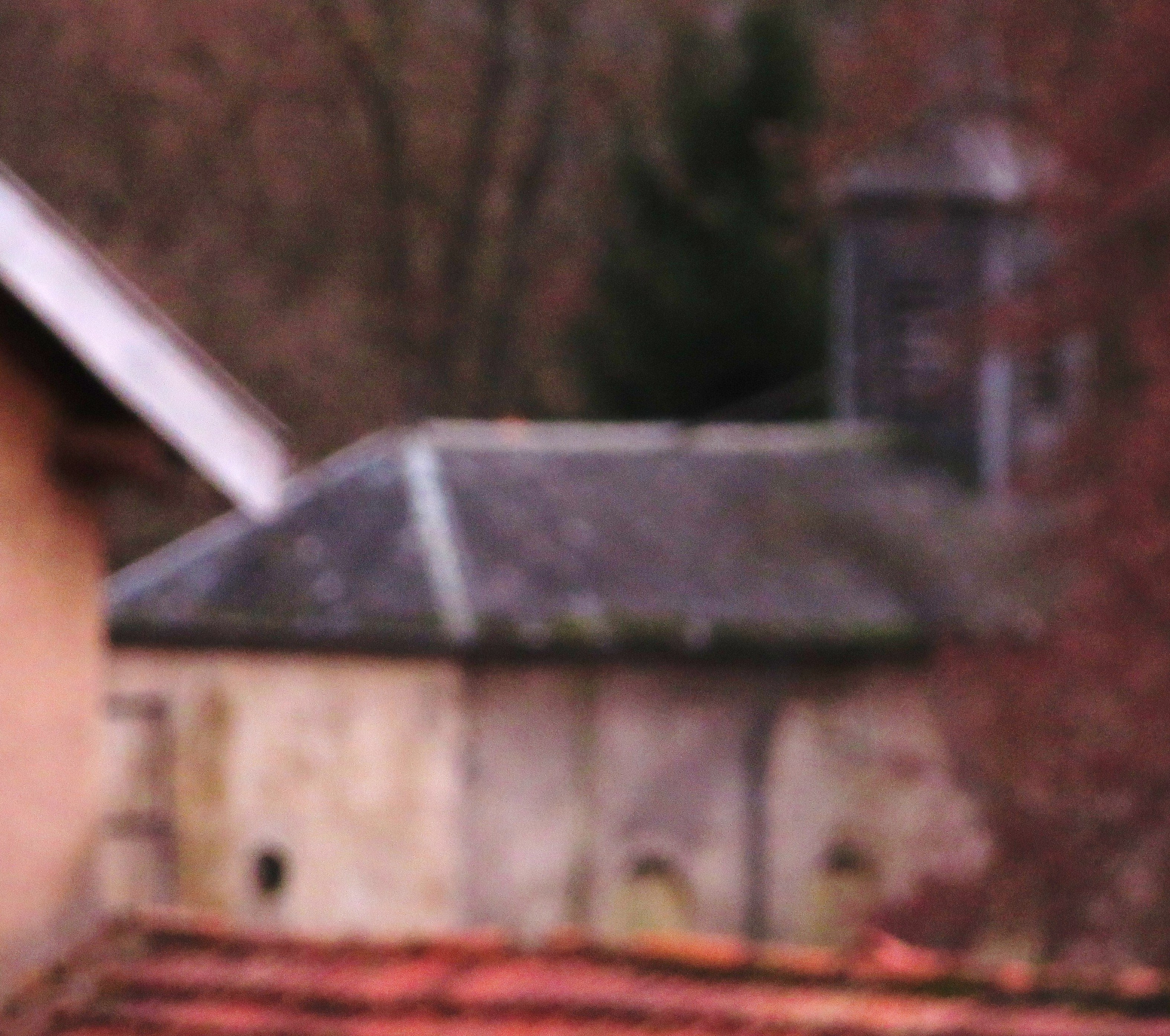 Richardmenil chapelle du Vieux-Château